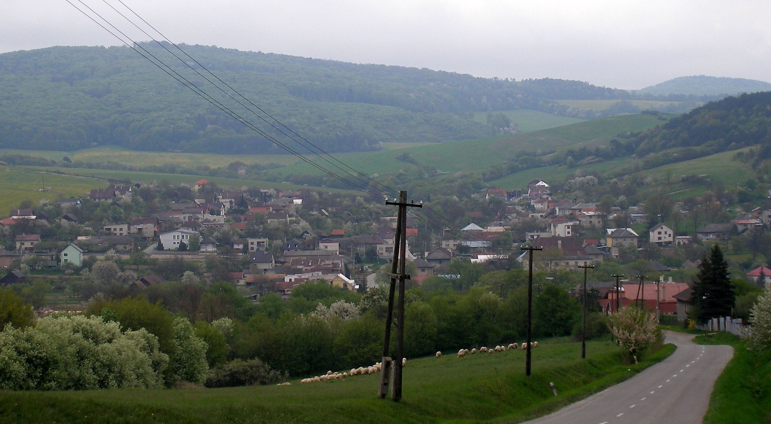 Obec Demjata okres Prešov región Šariš